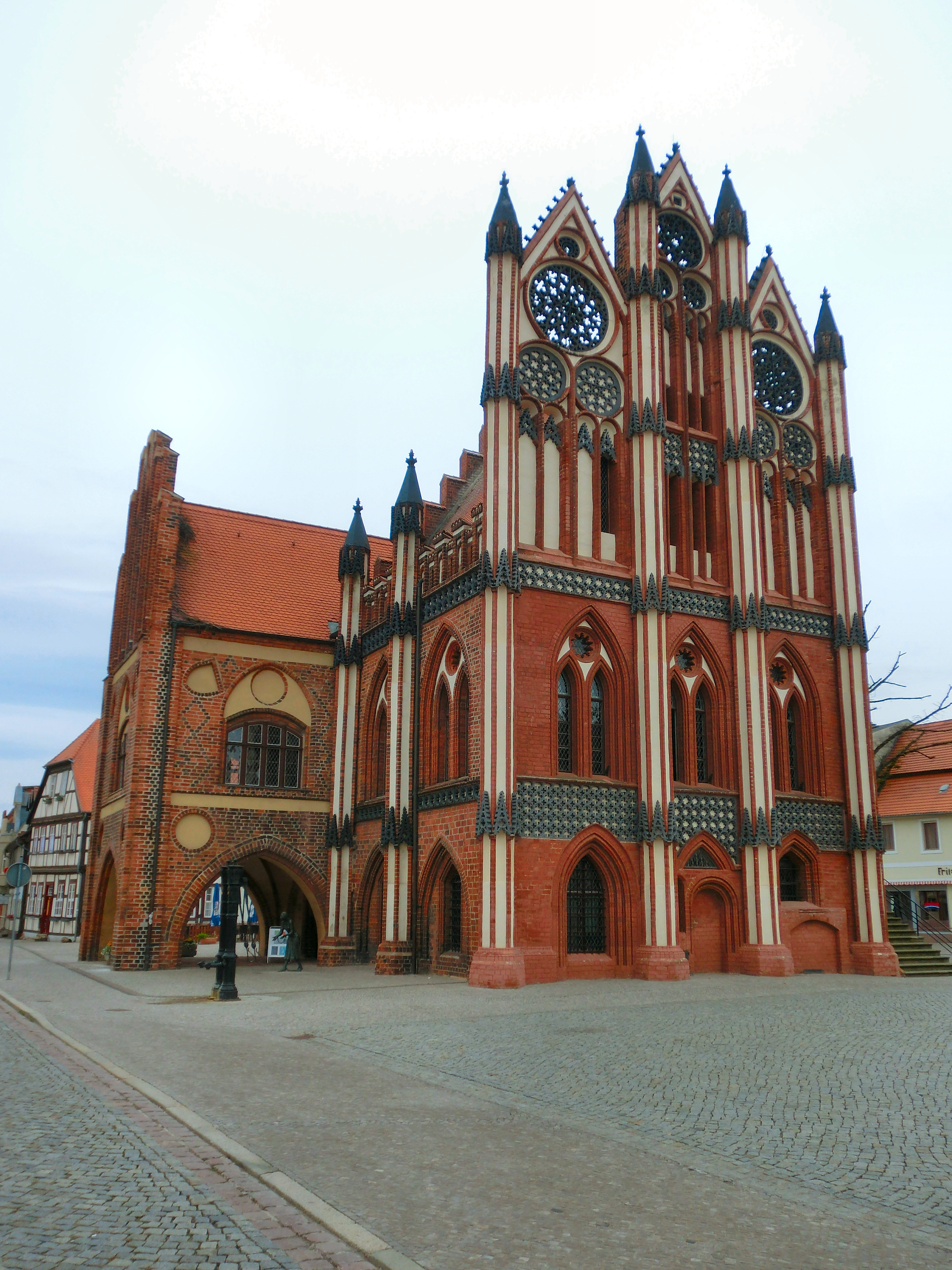 Tangermünde Rathaus Kirchstraße